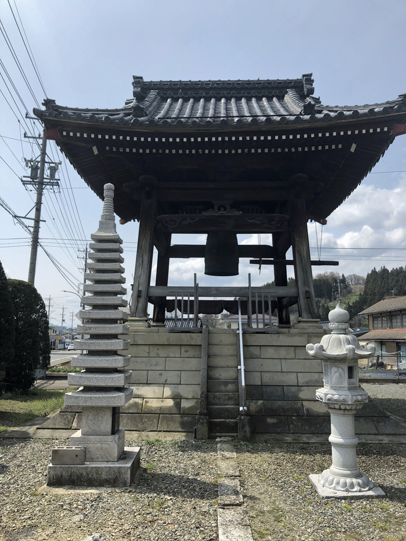 命徳寺の鐘楼